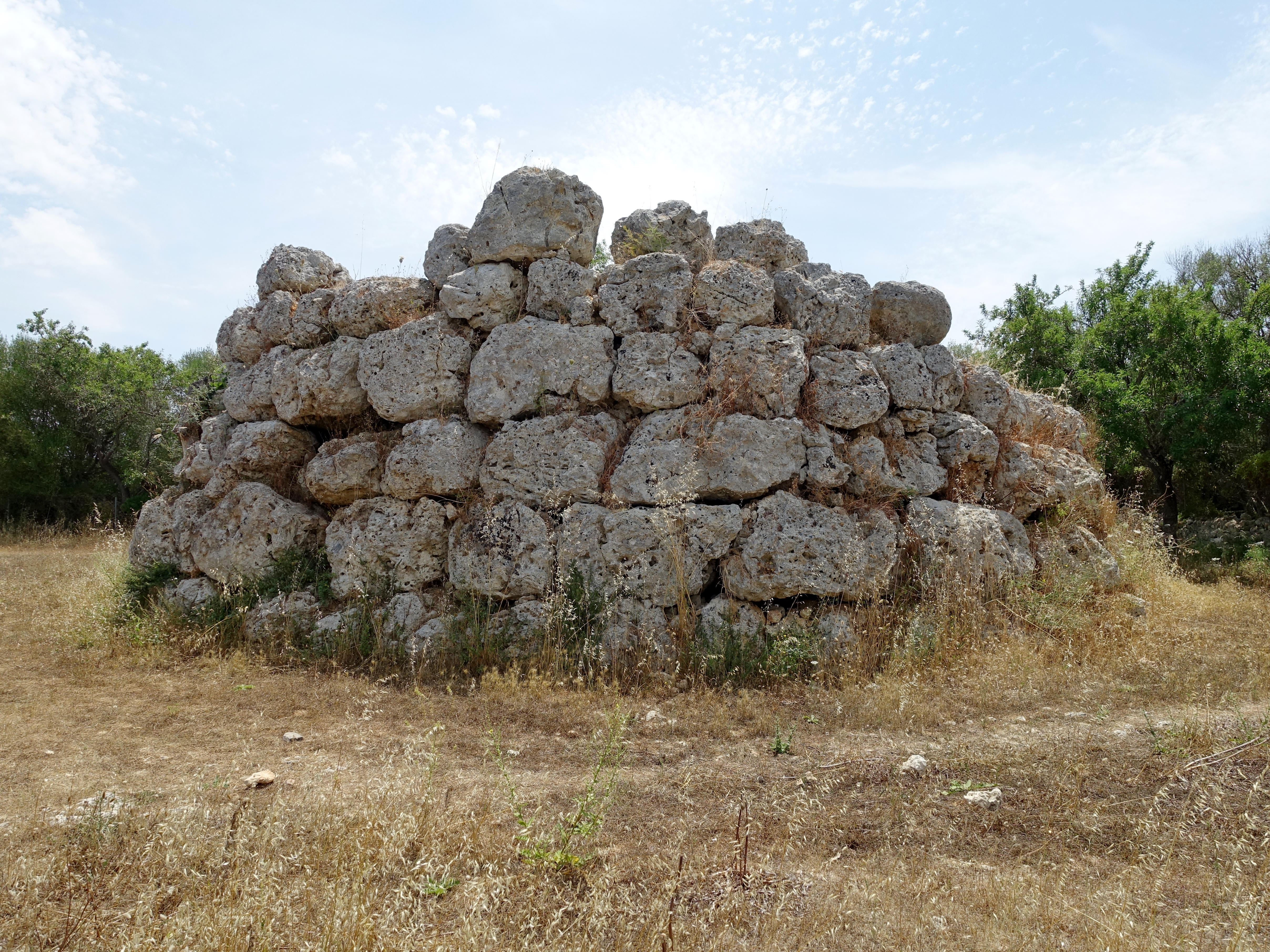 Talaiot de Son Fred, Gemeinde Sencelles, Mallorca, Spanien